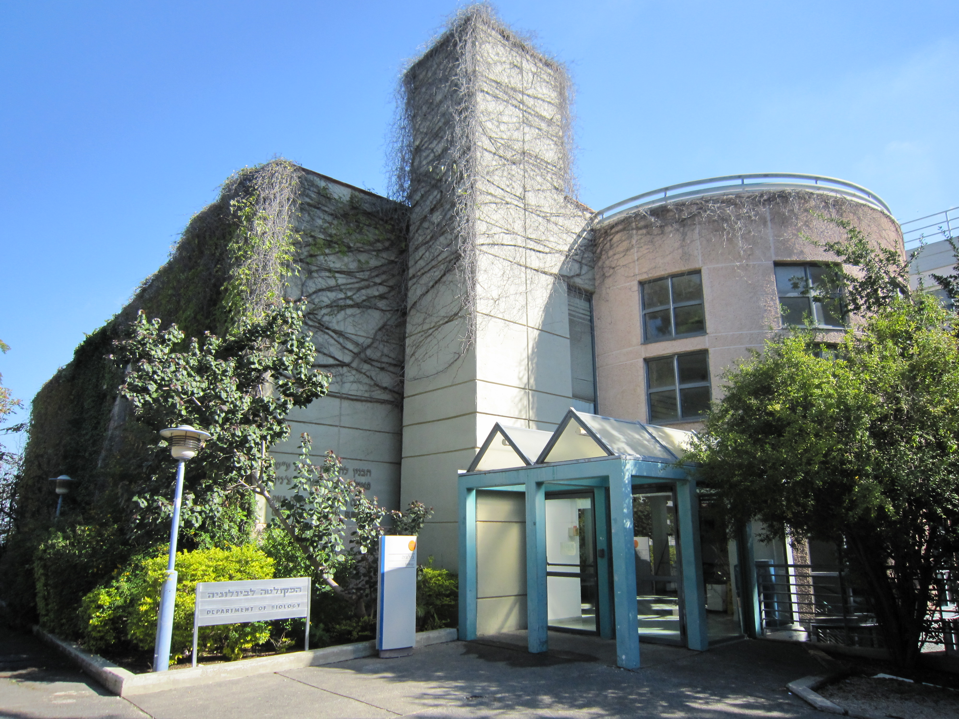 בנין הפקולטה לביולוגיה בטכניון